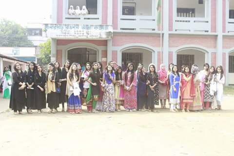 ২০১৬-২০১৭ শিক্ষাবর্ষের শিক্ষার্থীর র‍্যাগ ডে পালন।